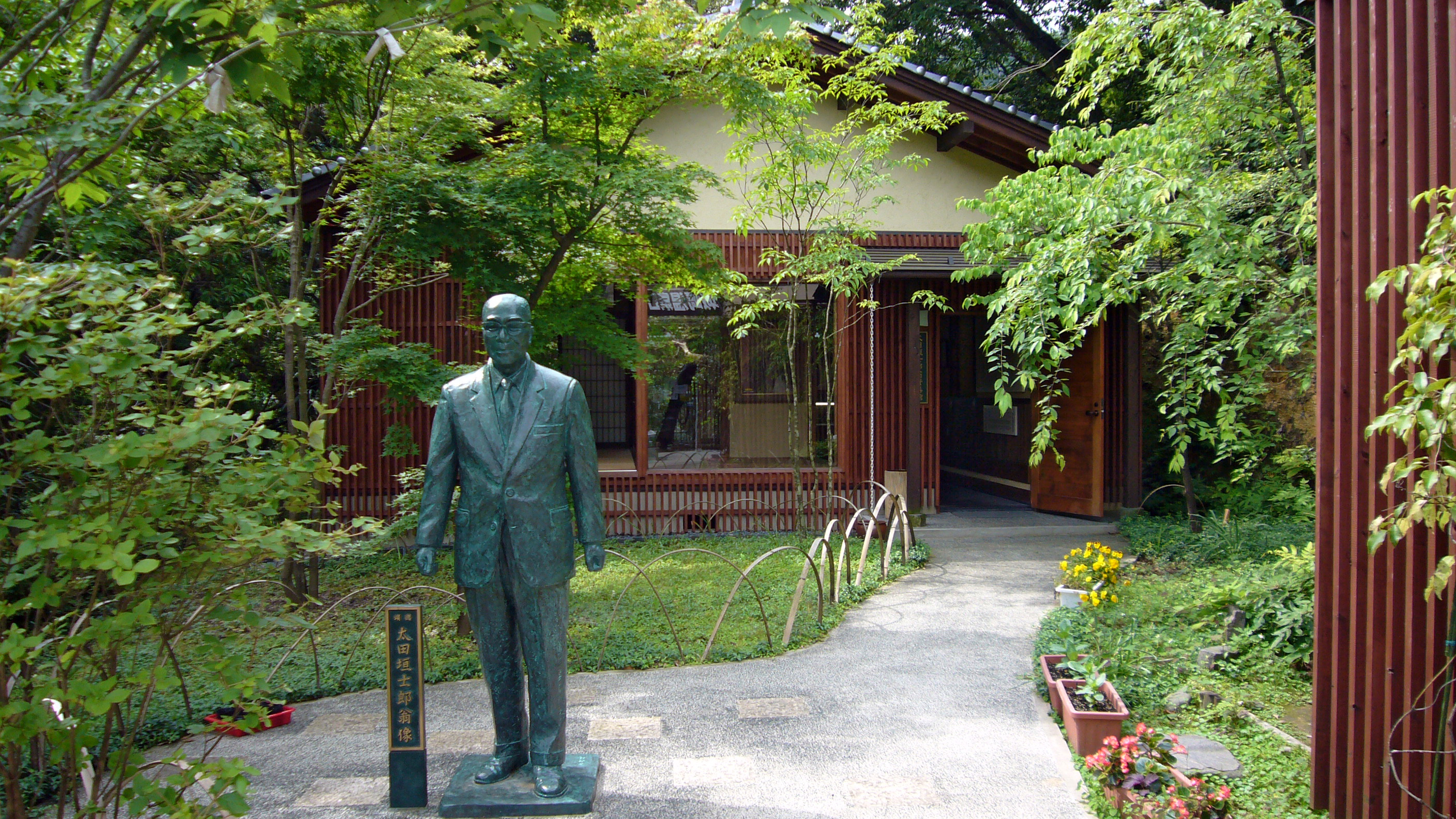 Otagaki Shiro Shiryokan, Kinosaki Onsen in Toyooka, Hyogo prefecture, Japan